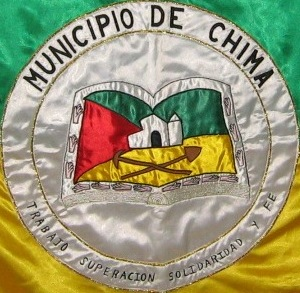 Escudo del municipio de Chima